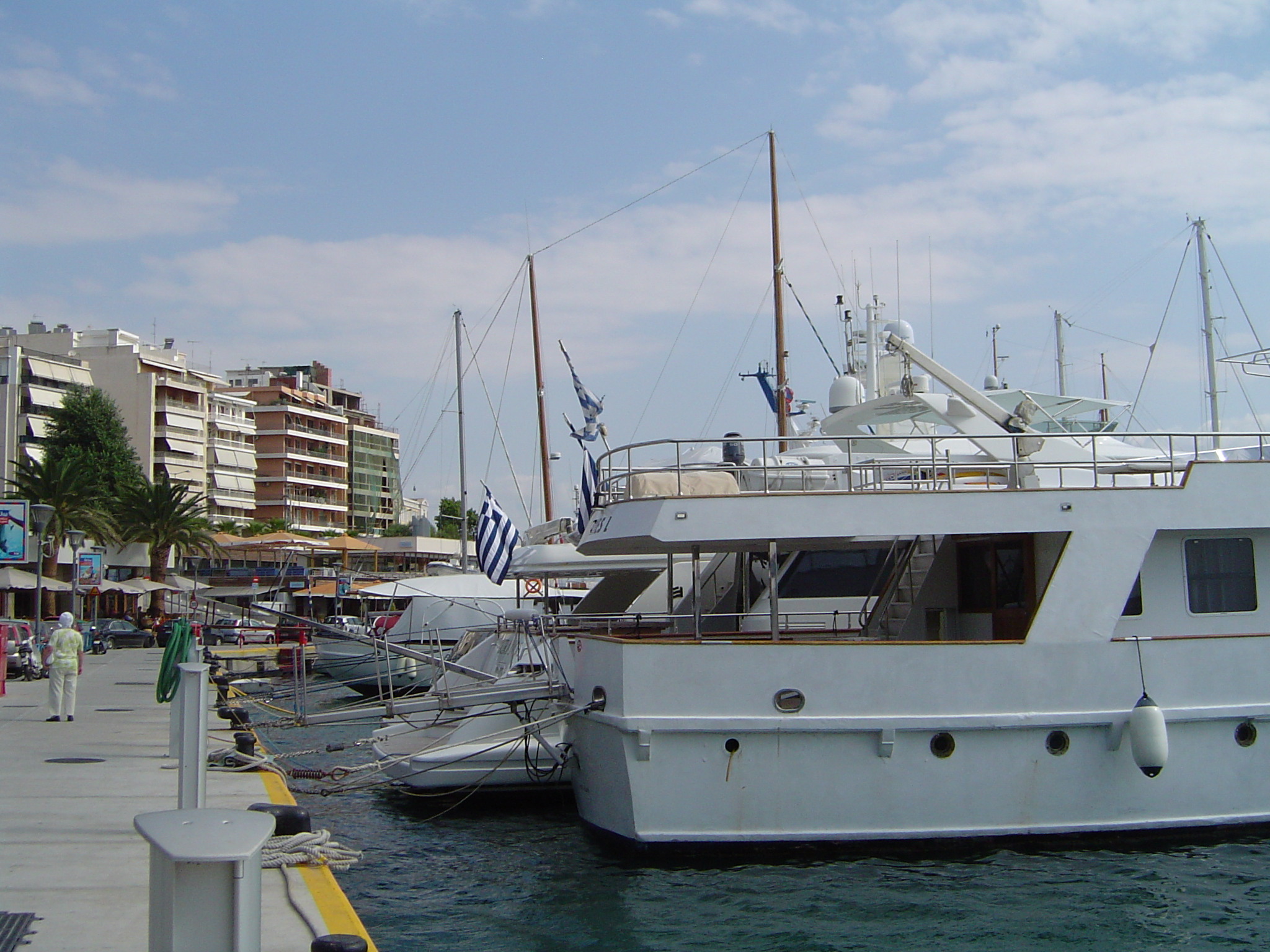 Sujet: Hafen vu Piräus 2004.